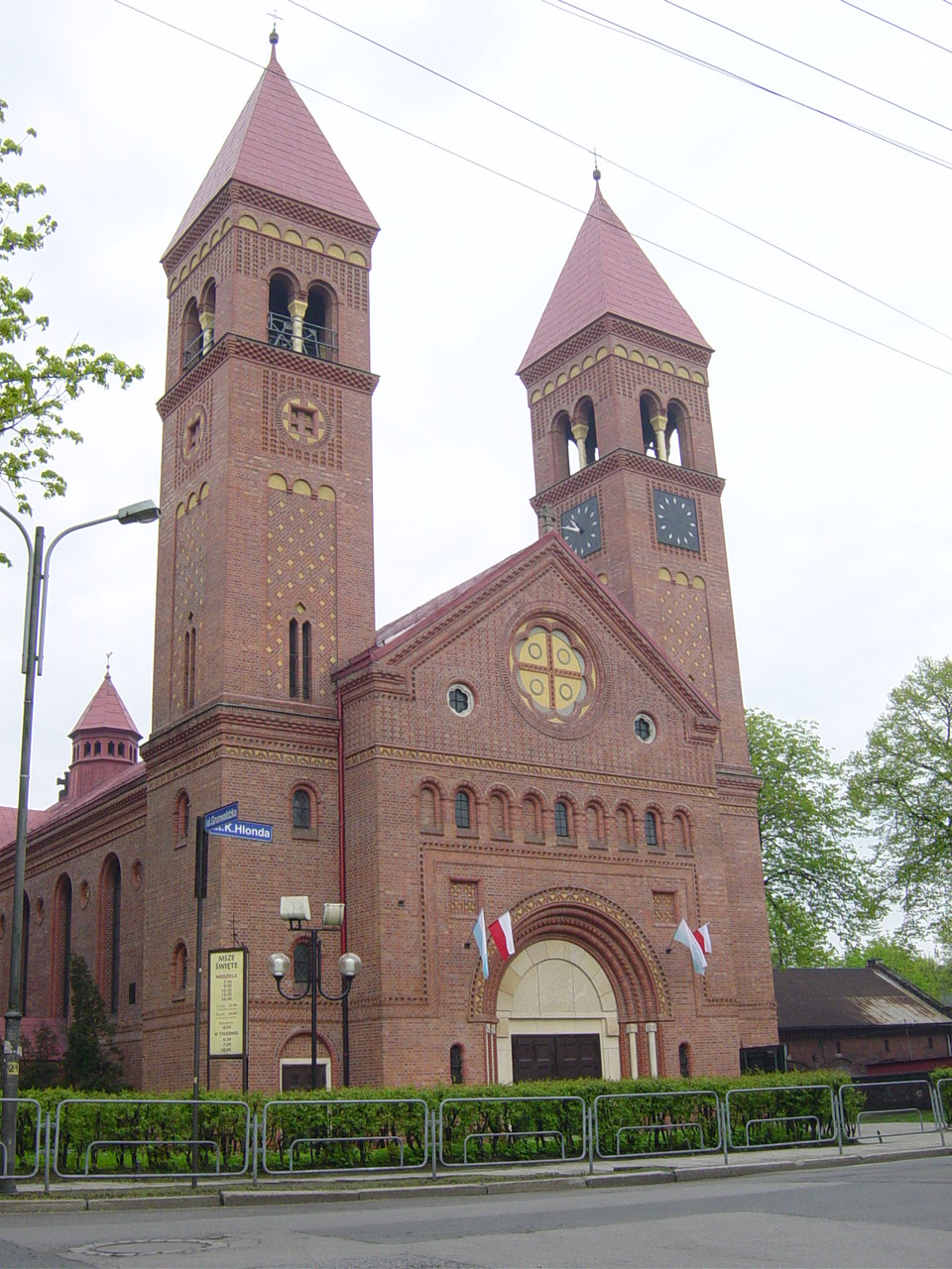 Kościoł św. Michala Archanioła w Orzegowie, Ruda Śląska